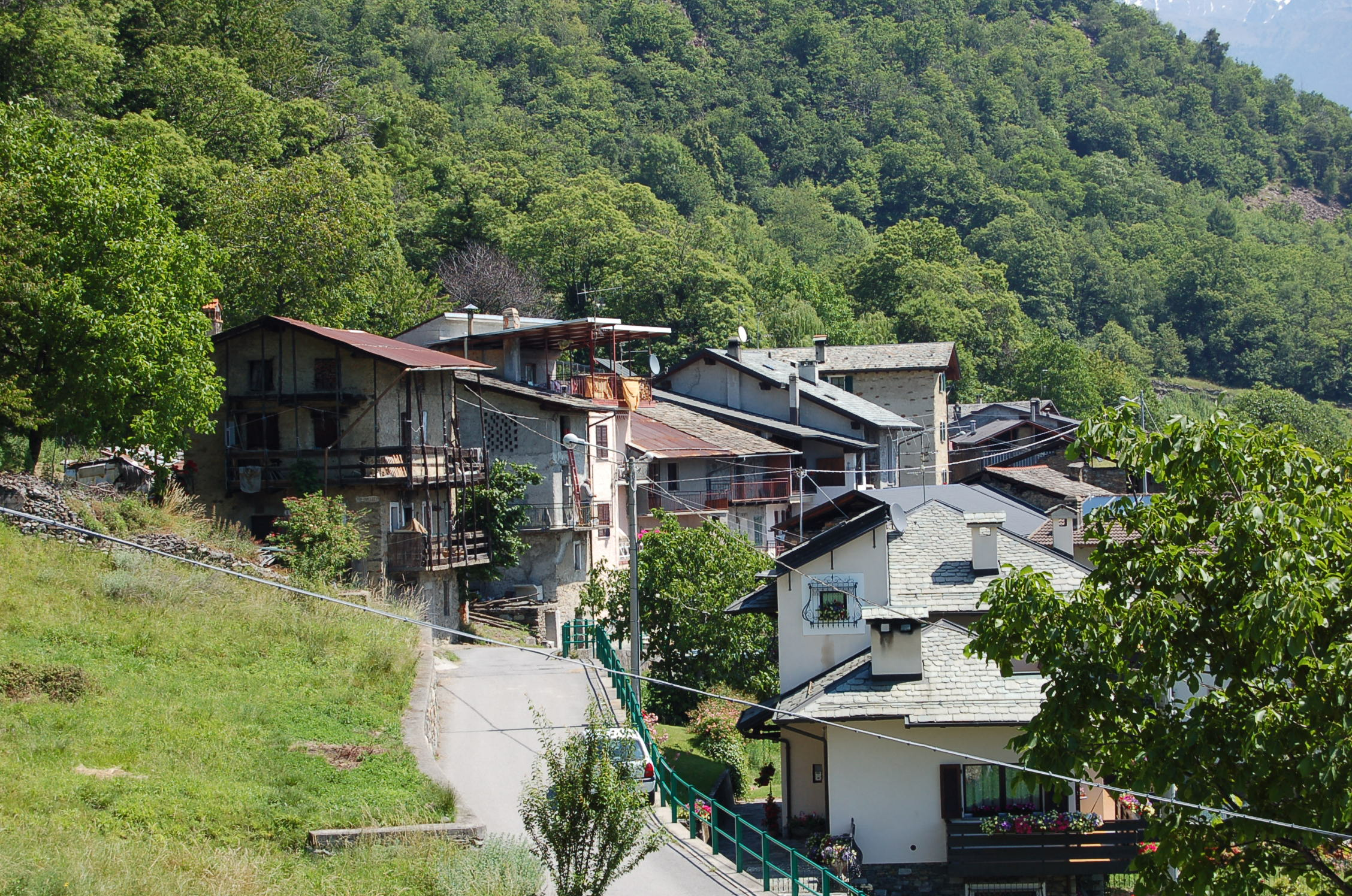 Scorcio della contrada Parlenti a Baruffini fraz. di Tirano Prov. Sondrio